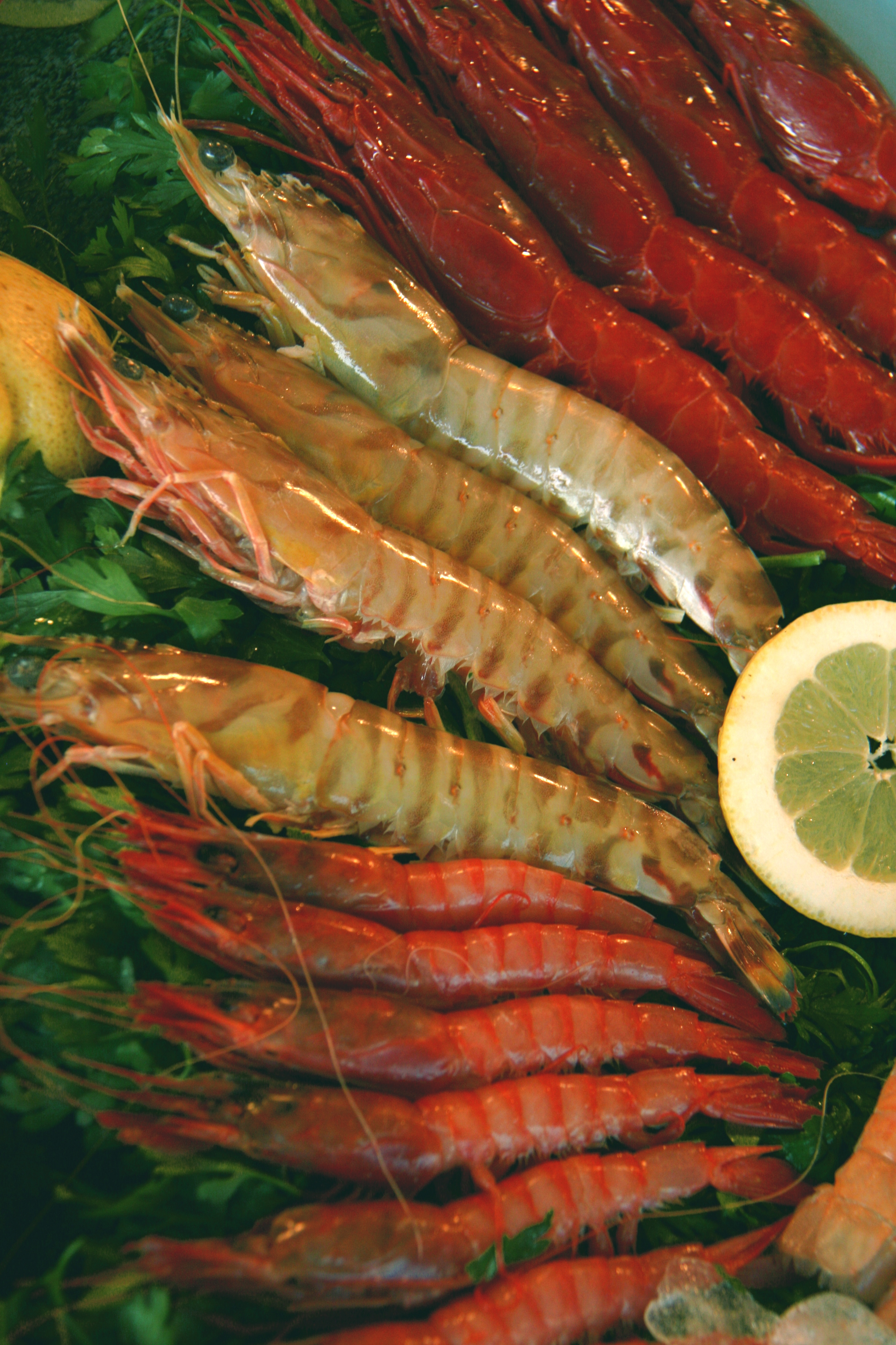 Marisco diverso - Langostinos